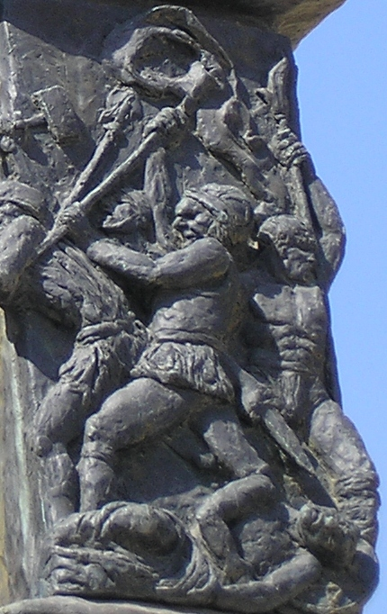 The Knesset Menorah, Jerusalem (detail - Hasmonean)